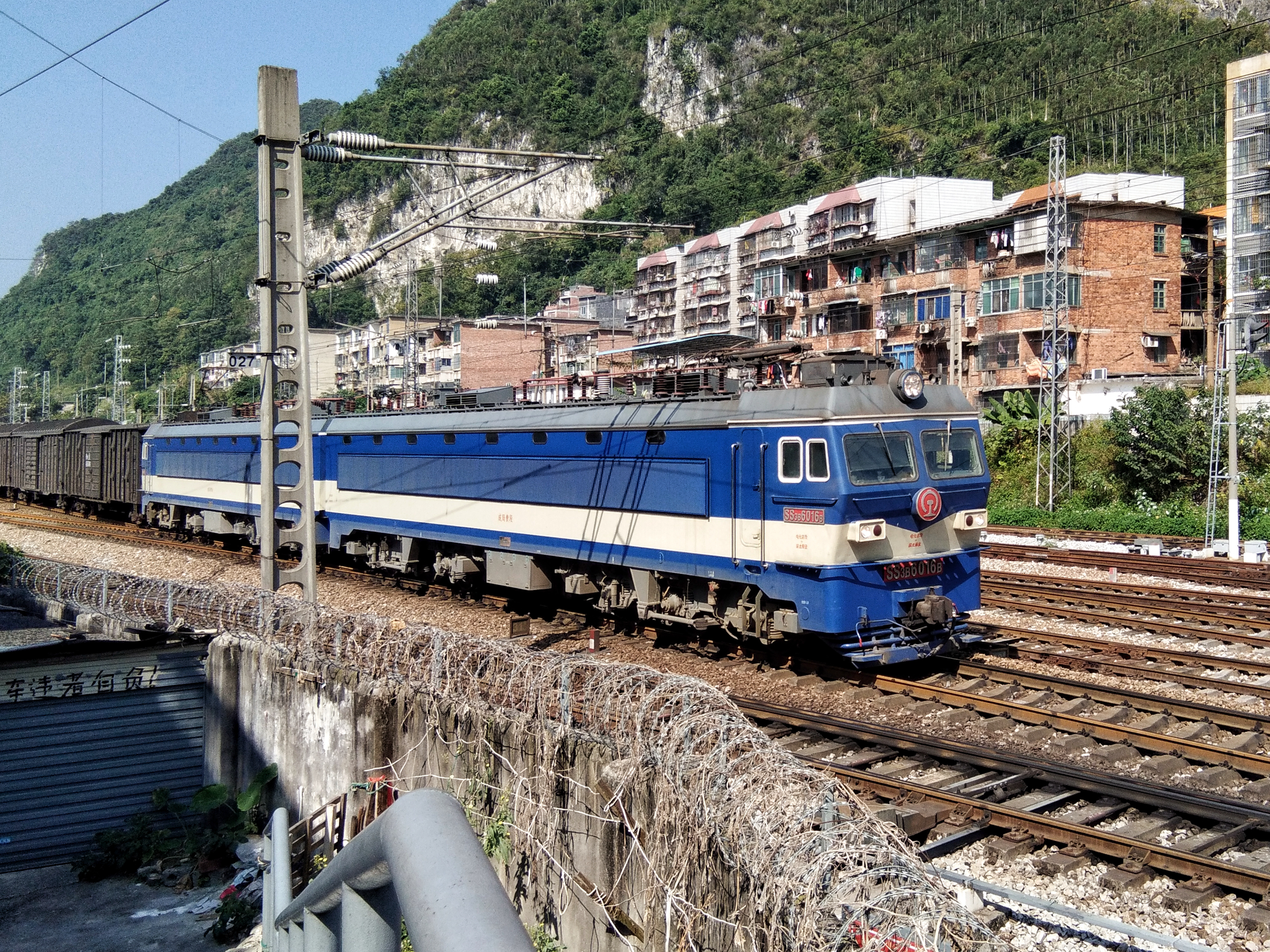 中文（中国大陆）: 6016号韶山3B型电力机车牵引货列加速离开金城江站。